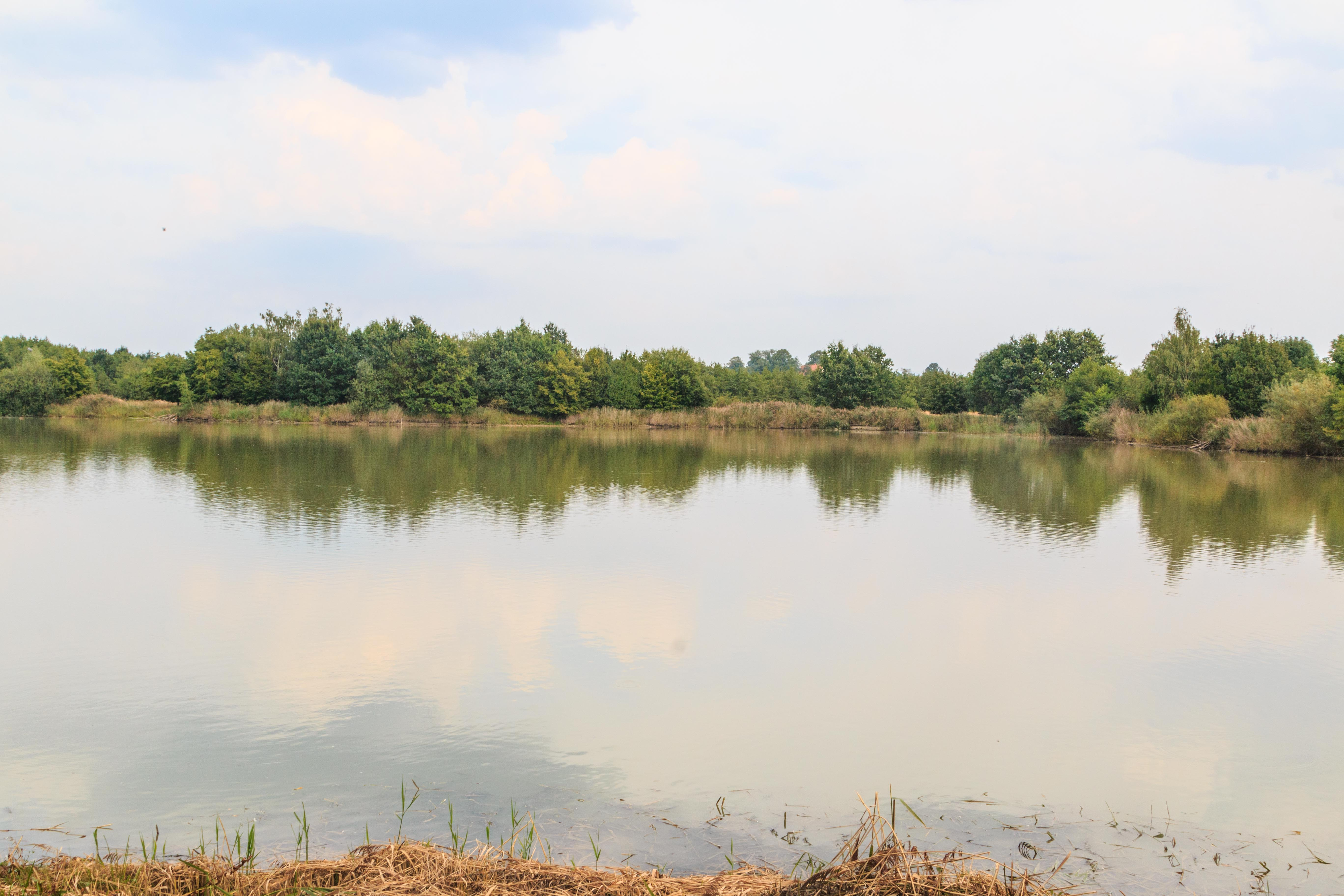 Rybník Frešle u Librantic